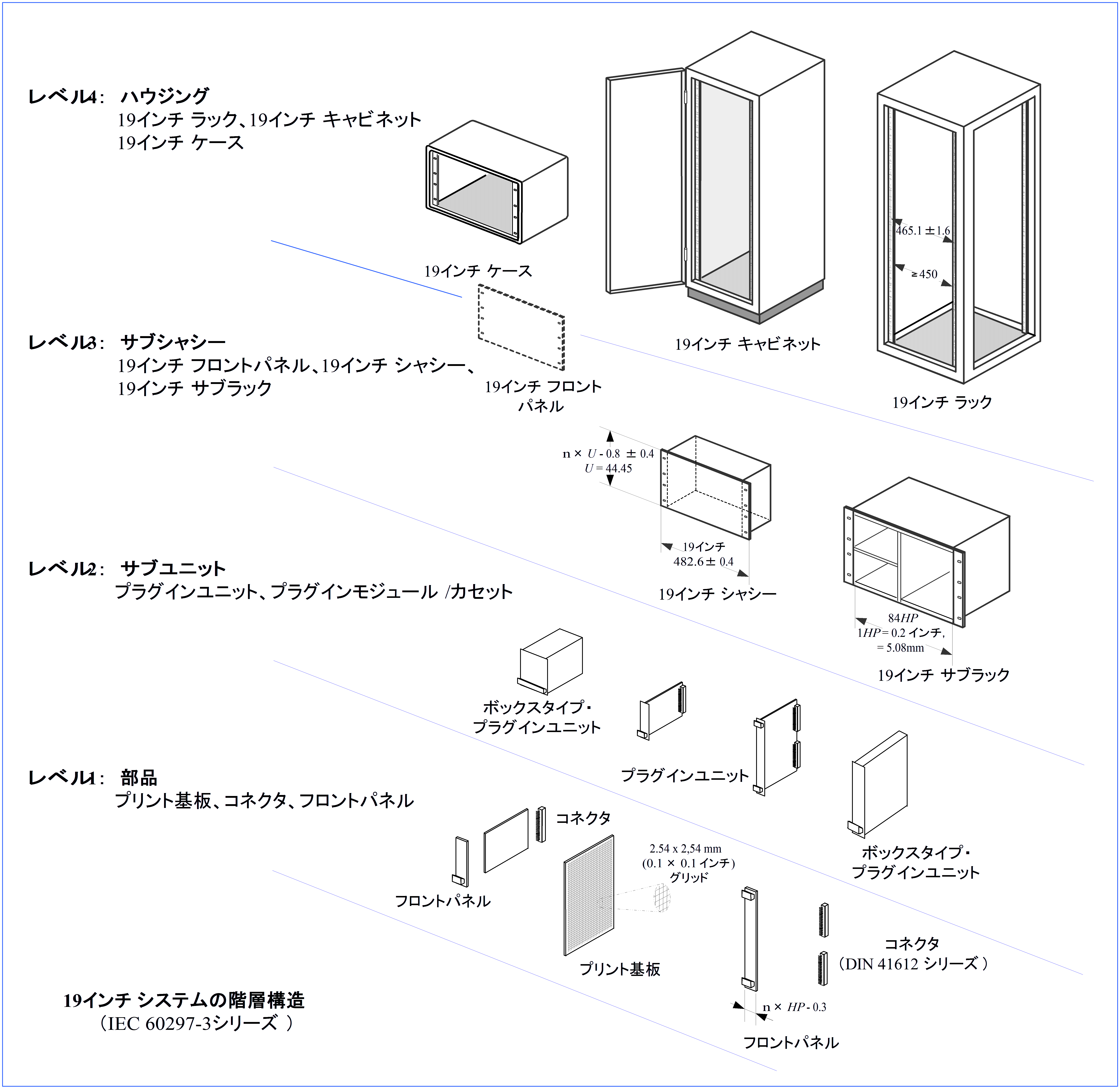 電子機器用の標準機構である19インチシステム（IEC 60297-3 シリーズ）の階層構造を説明した図